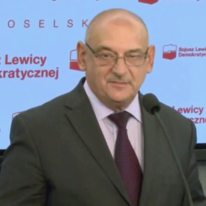 Janusz Krasoń, lewicowy polityk.